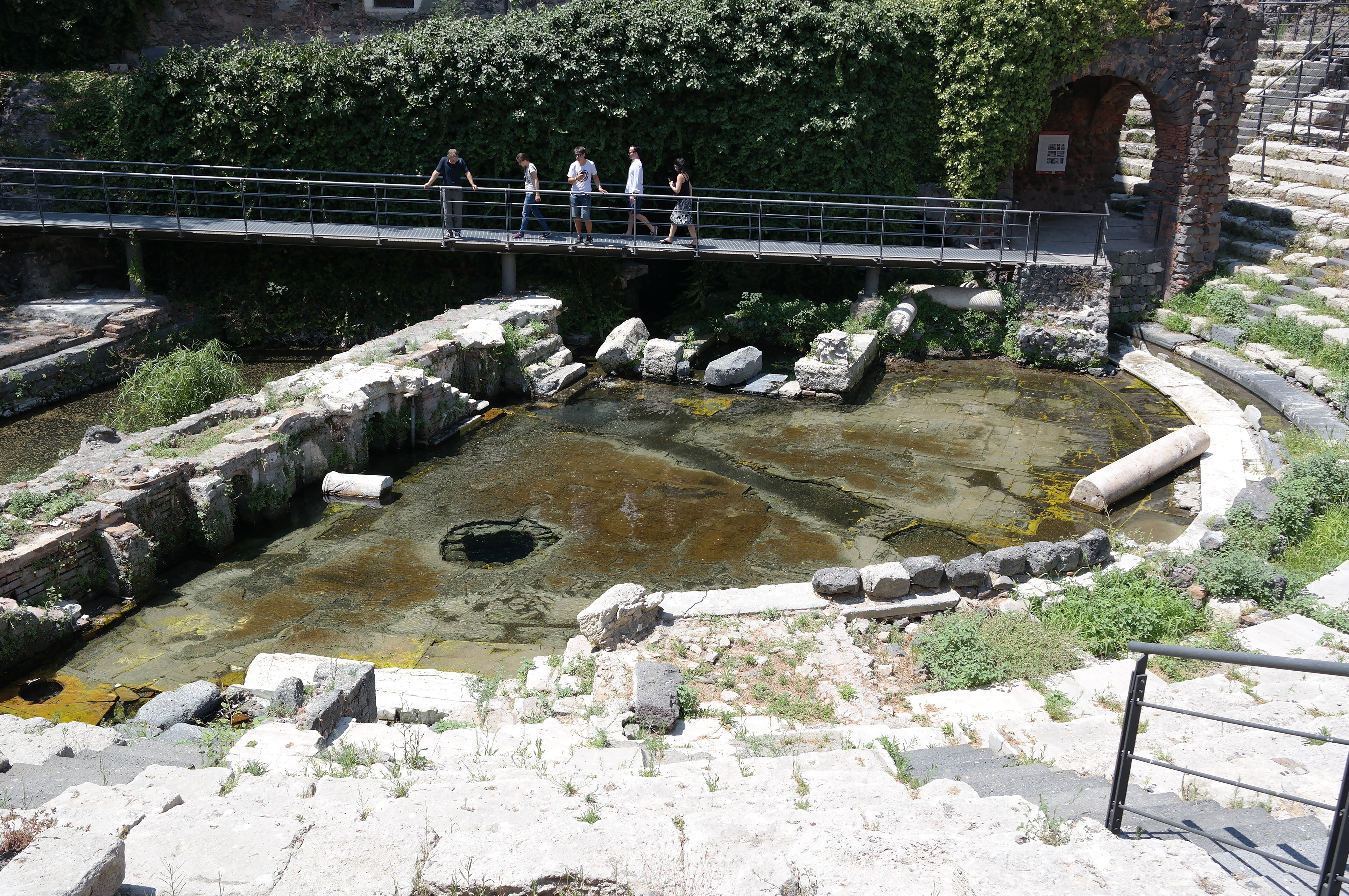 Scaena del Teatro Romano di Catania, oggi invasa dall'acqua